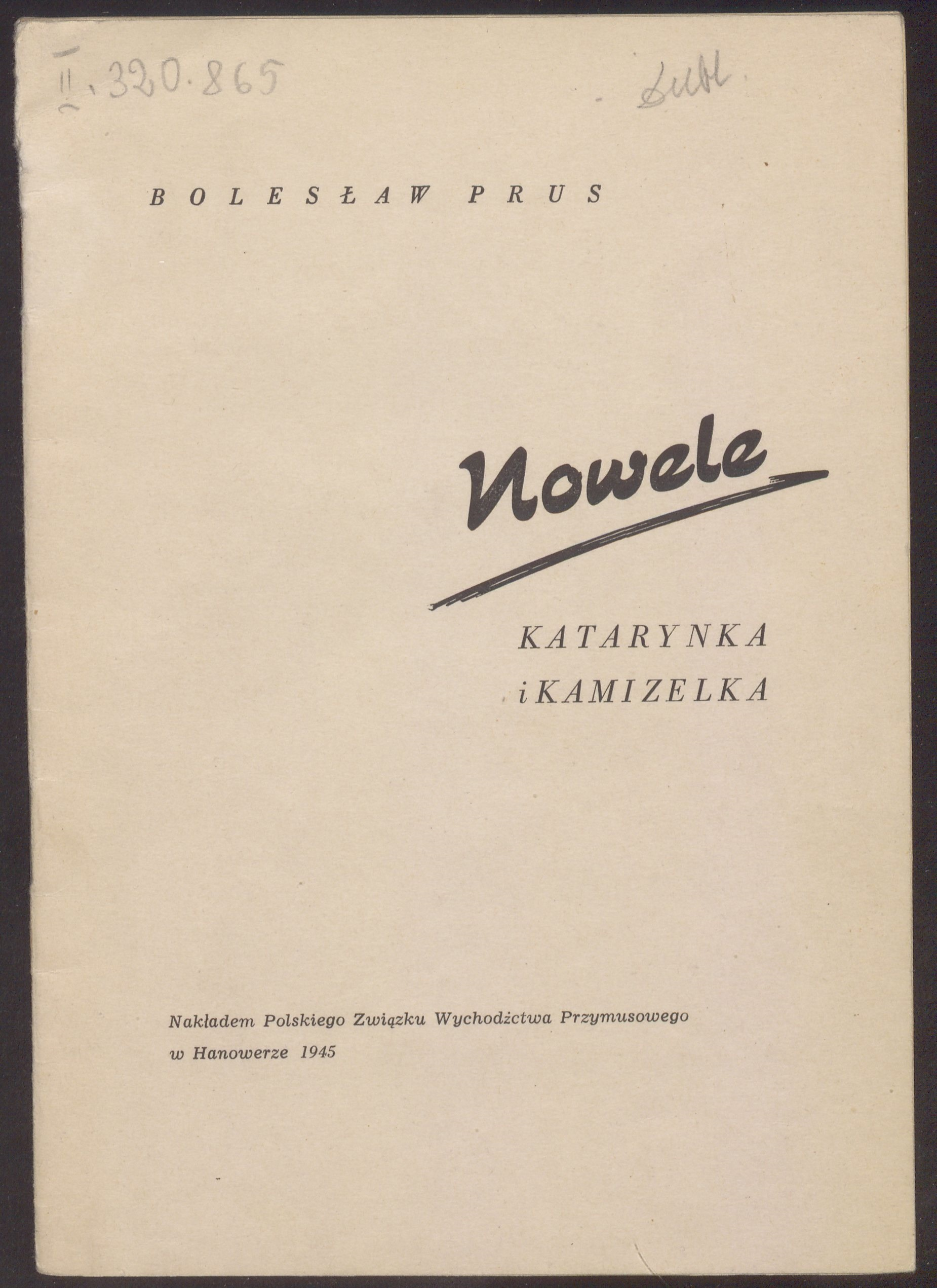 Kamizelka, wyd. 1945